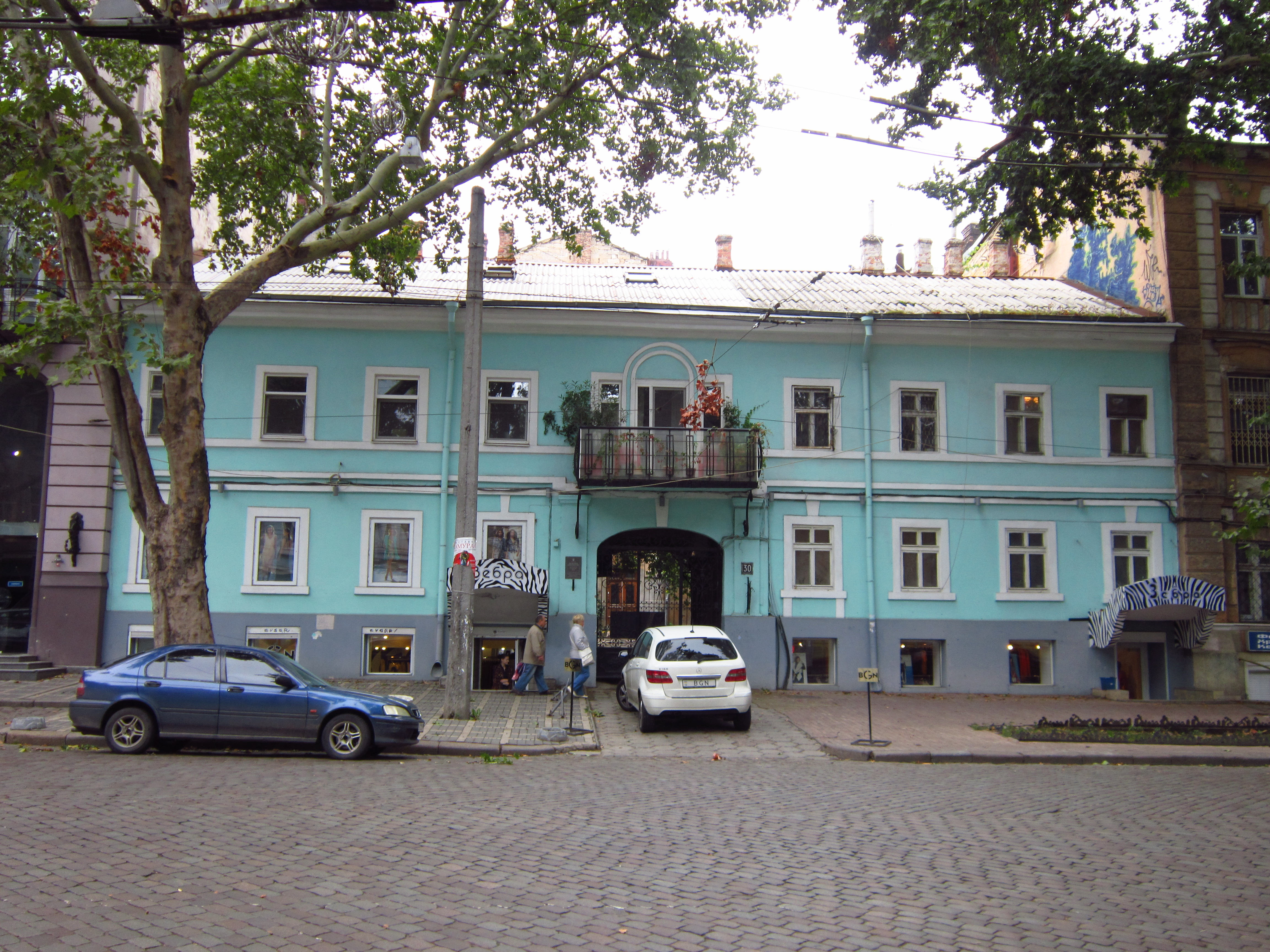 Будинок житловий, Одеса, Пушкінська вул., 30